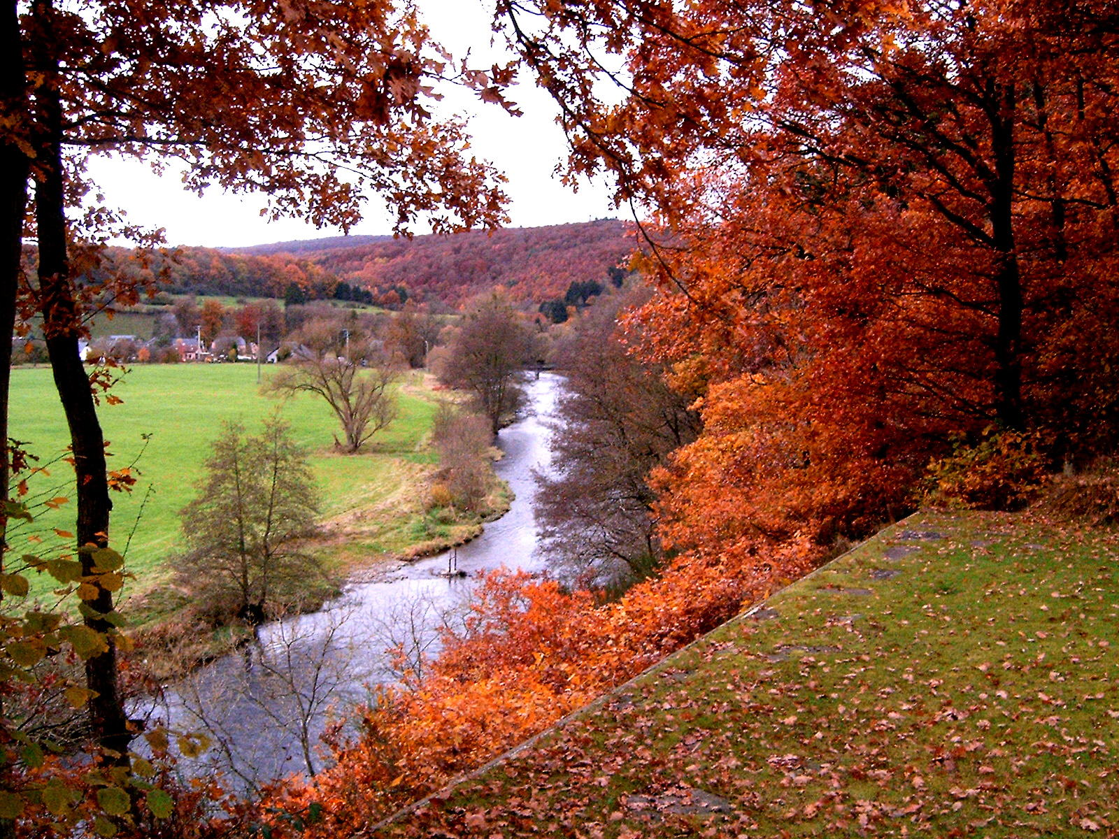 Herfst in Belgie